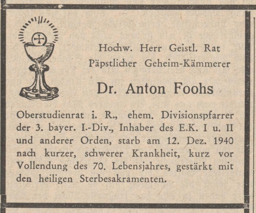 Anton Fooß, Bayerischer Divisionspfarrer